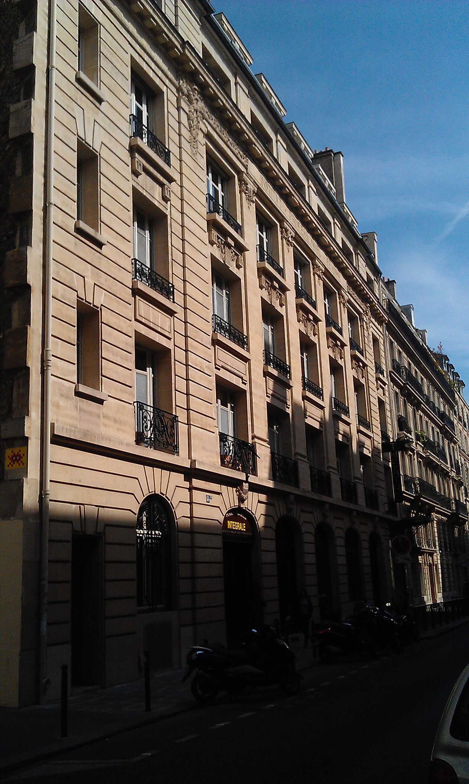 Théâtre Tristan-Bernard . This photo was uploaded with Wiki Loves Monuments mobile 1.2.1 (Android).